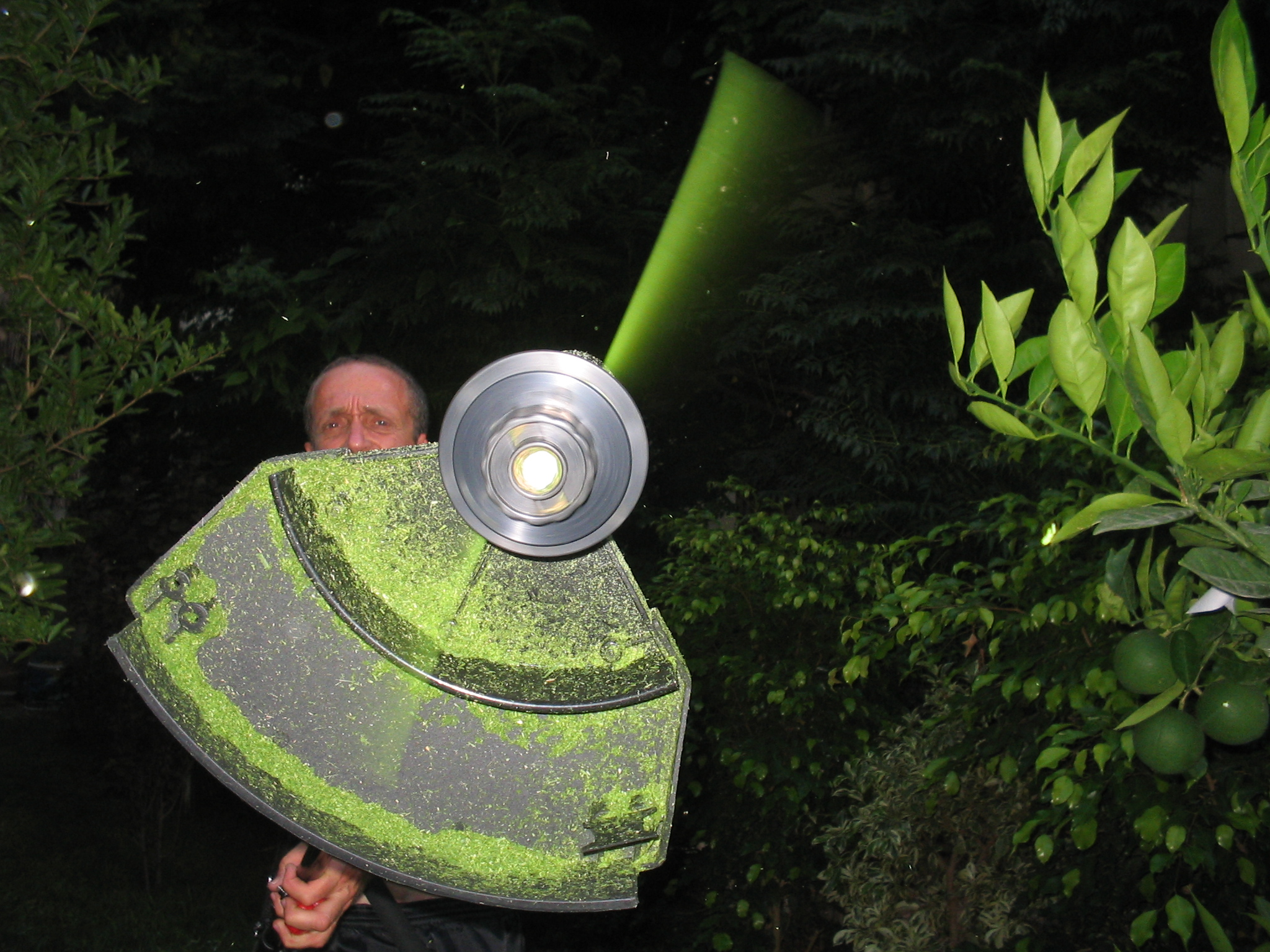 מכסחת דשא בפעולה